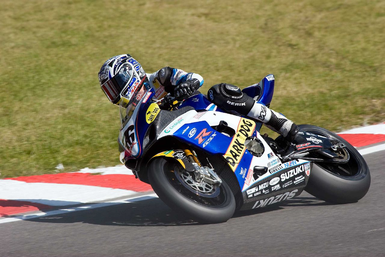 Max Neukirchner, WSBK Round 10 Brands Hatch 2007